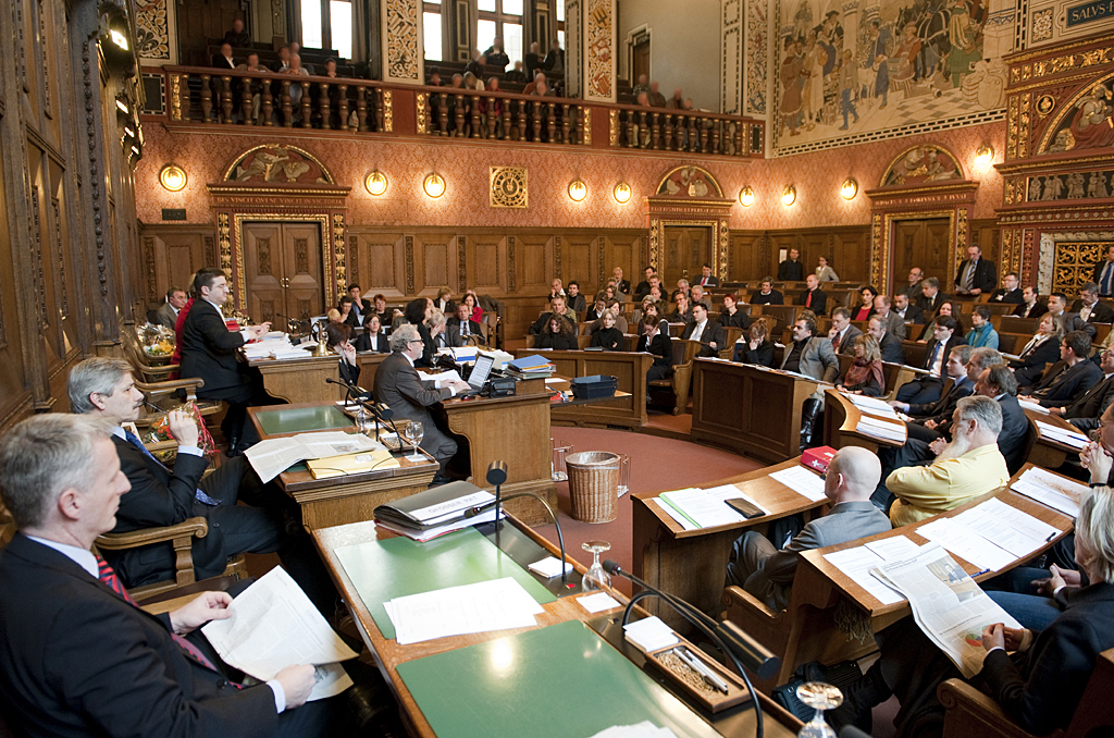 Grossratssaal, Präsidium, Regierungssitze